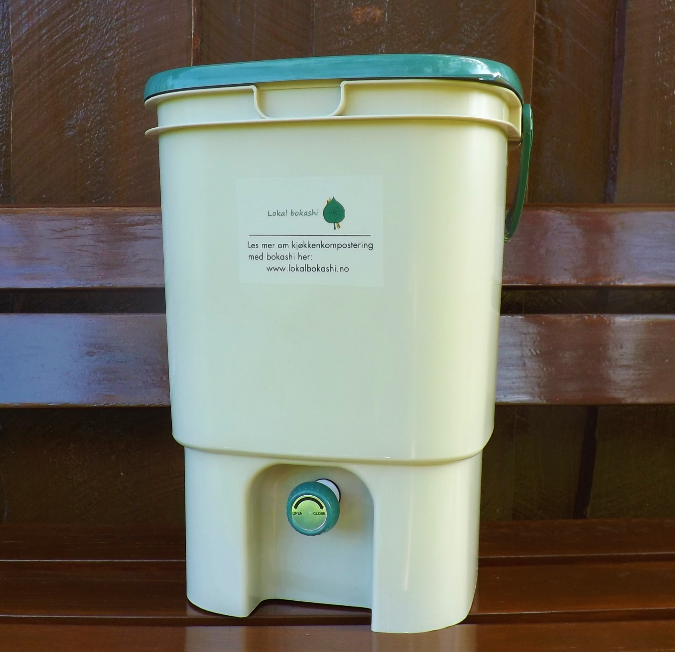 Bøtte som er spesiallaget for bokashi